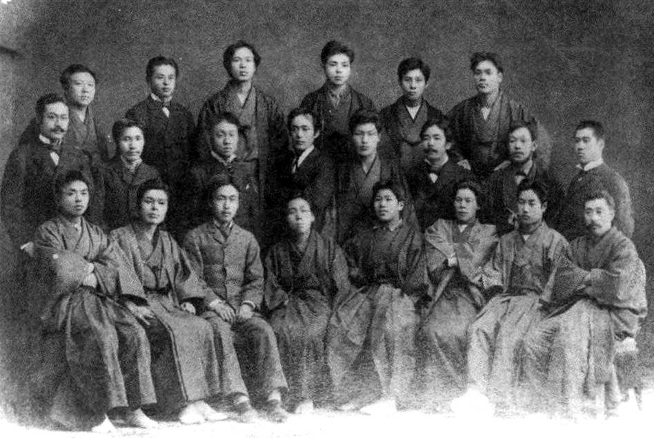 明治大学創立者及び西園寺公望などの創立関係者たち